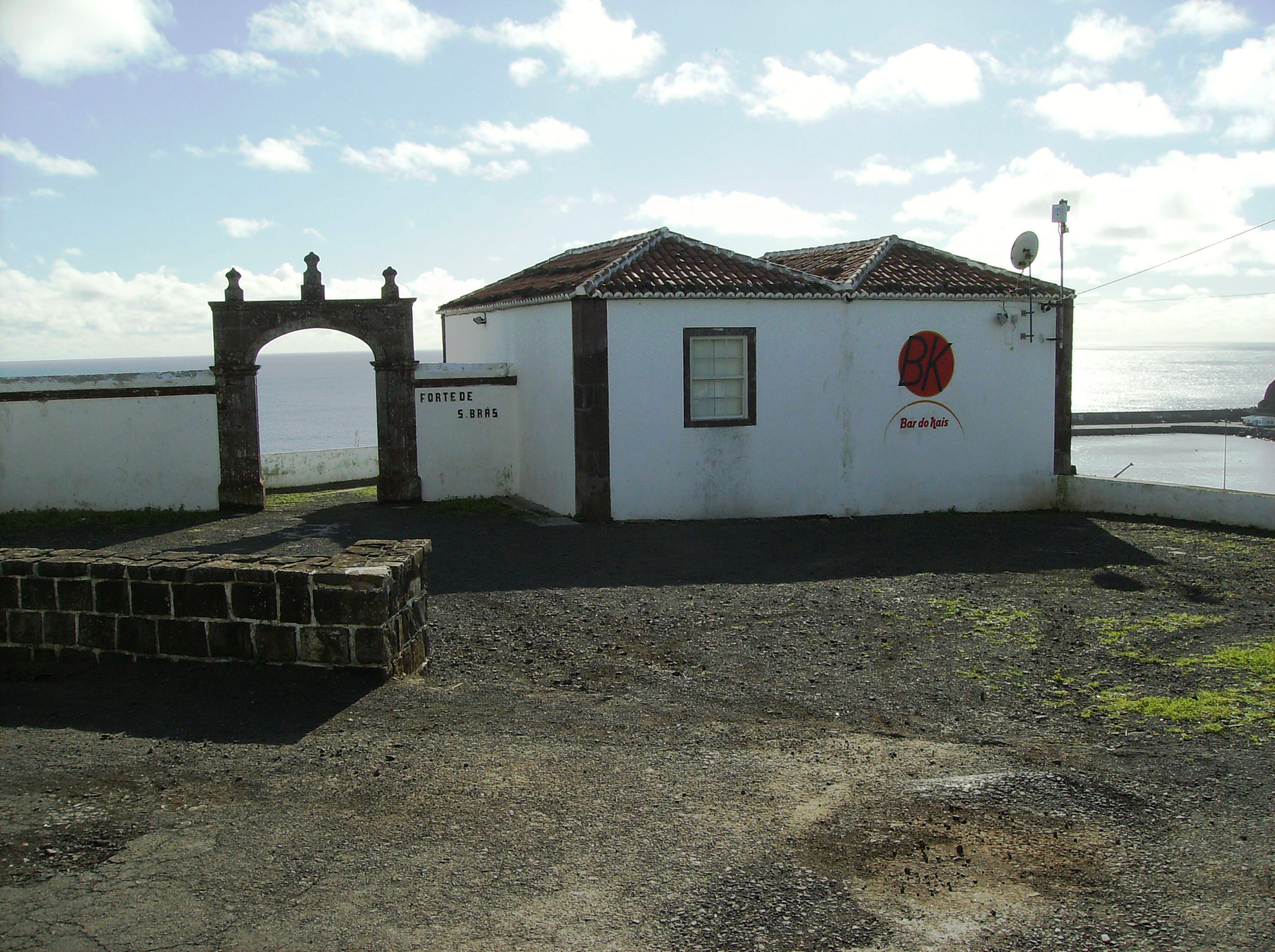 Forte de São Brás de Vila do Porto, Ilha de Santa Maria, Açores, Portugal